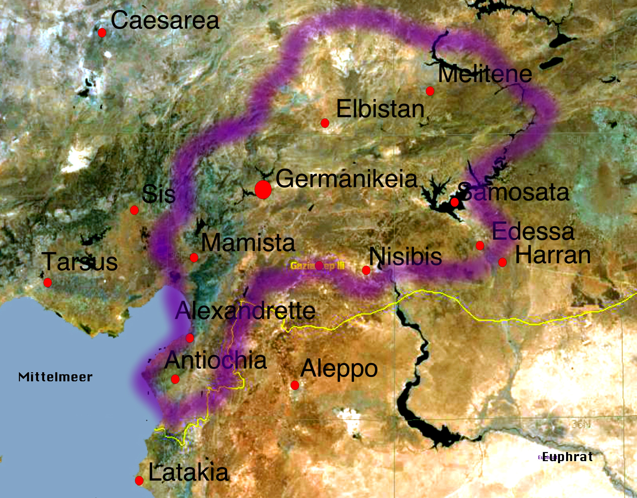 Herrschaftsgebiet des Philaretosm hauptsaechlich nach den Angaben von Boase. Grundlage: Satelitenbild Nordsyrien, Nasa Worldwind, 15.4.2005